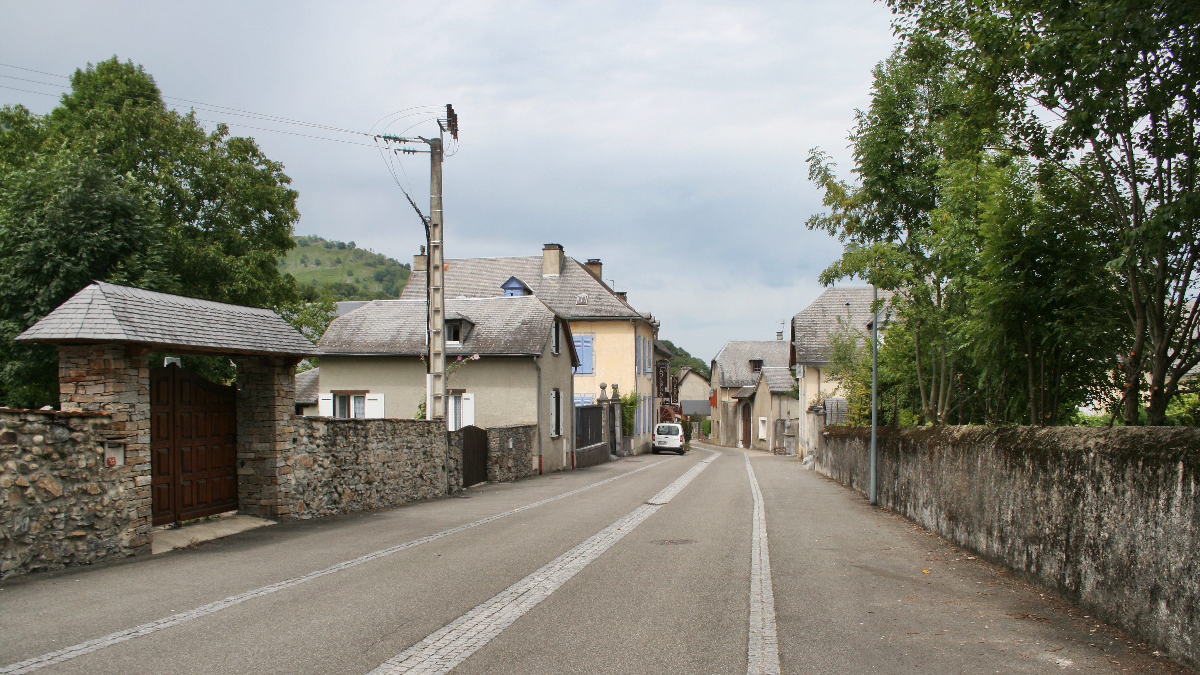 Rue principale de Beaudéan, dans les Hautes Pyrénées